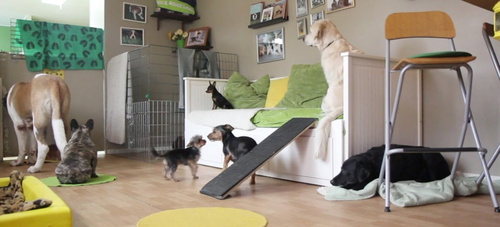 Stinas hunddagis i Malmö.